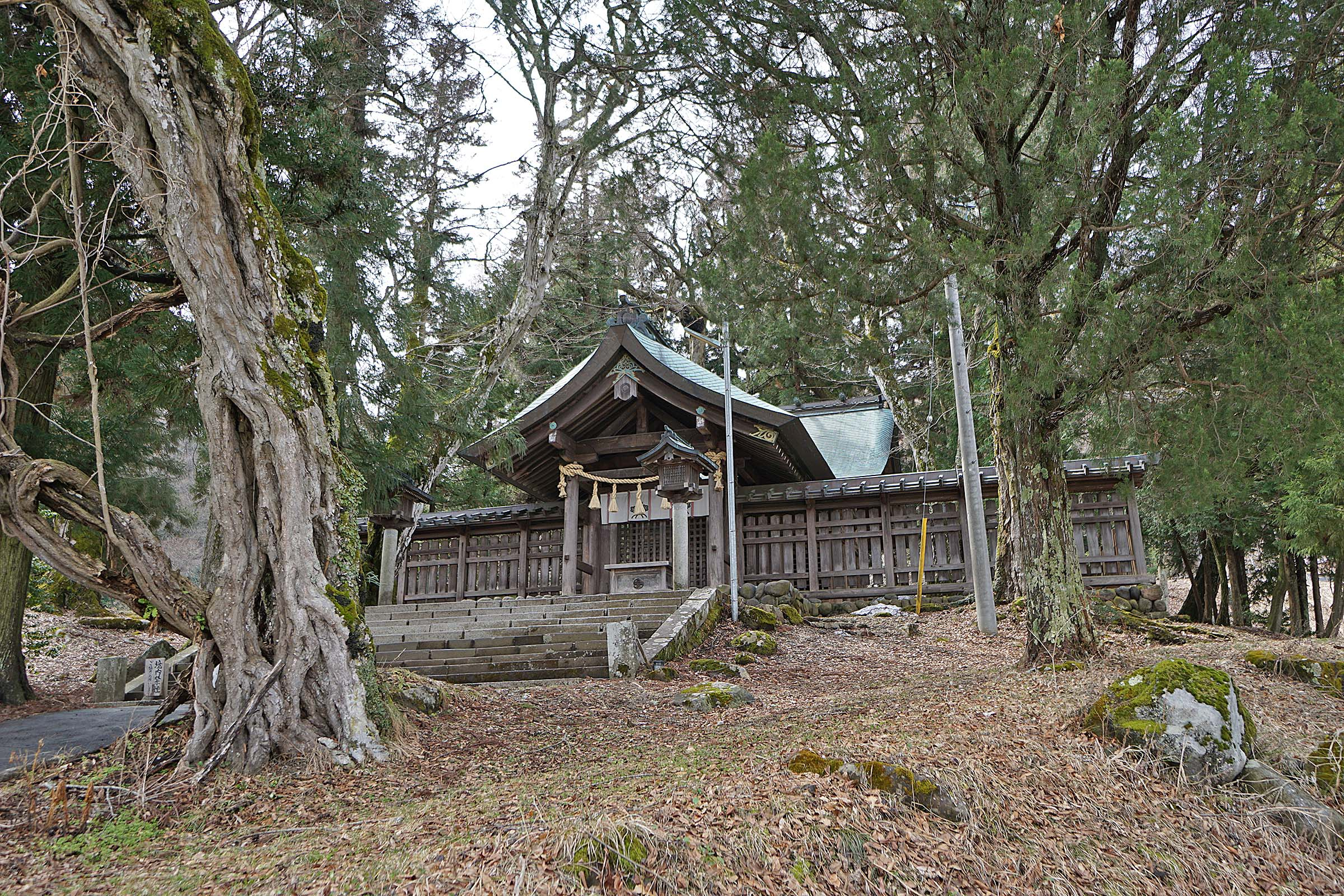 Suwa taisha Kamisha Maemiya , 諏訪大社 上社 前宮